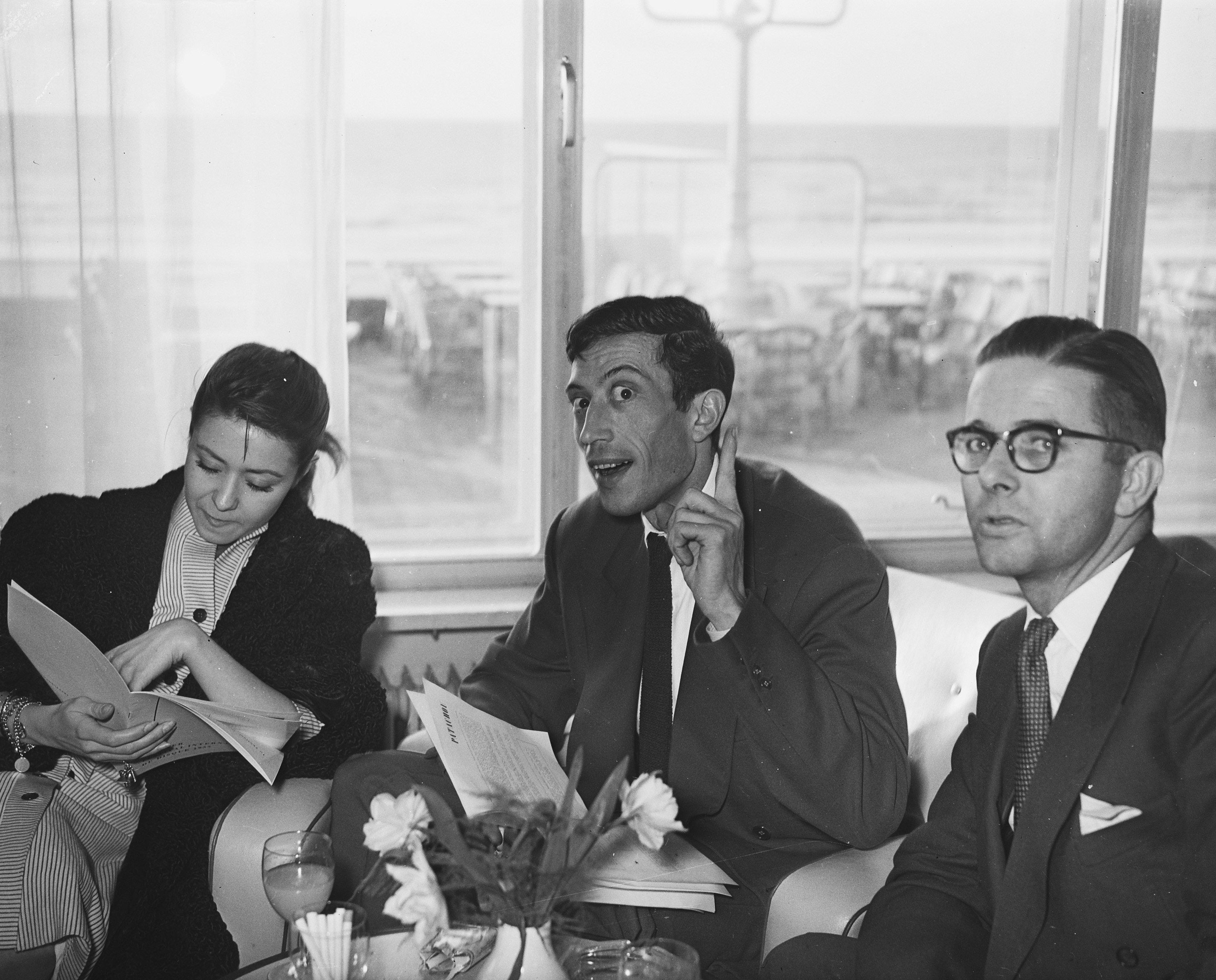 Collectie / Archief : Fotocollectie Anefo Reportage / Serie : [ onbekend ] Beschrijving : Optreden Patachou Kurhaus Scheveningen Datum : 21 april 1955 Locatie : Scheveningen, Zuid-Holland Trefwoorden : Optreden Instellingsnaam : Kurhaus Fotograaf : Bilsen, Joop van / Anefo Auteursrechthebbende : Nationaal Archief Materiaalsoort : Glasnegatief Nummer archiefinventaris : bekijk toegang 2.24.01.09 Bestanddeelnummer : 907-0888 Reacties Geplaatst door Musicfan op 23 juli 2017 - 14:30. In het midden de Franse zanger/komiek Philippe Clay. NB. Zowel Patachou als Philippe Clay traden op tijdens 'Premier Festival International du Disque' in het Nederlands 'Eerste nationale festival van de Grammofoonplaat 1955'. Zie ook